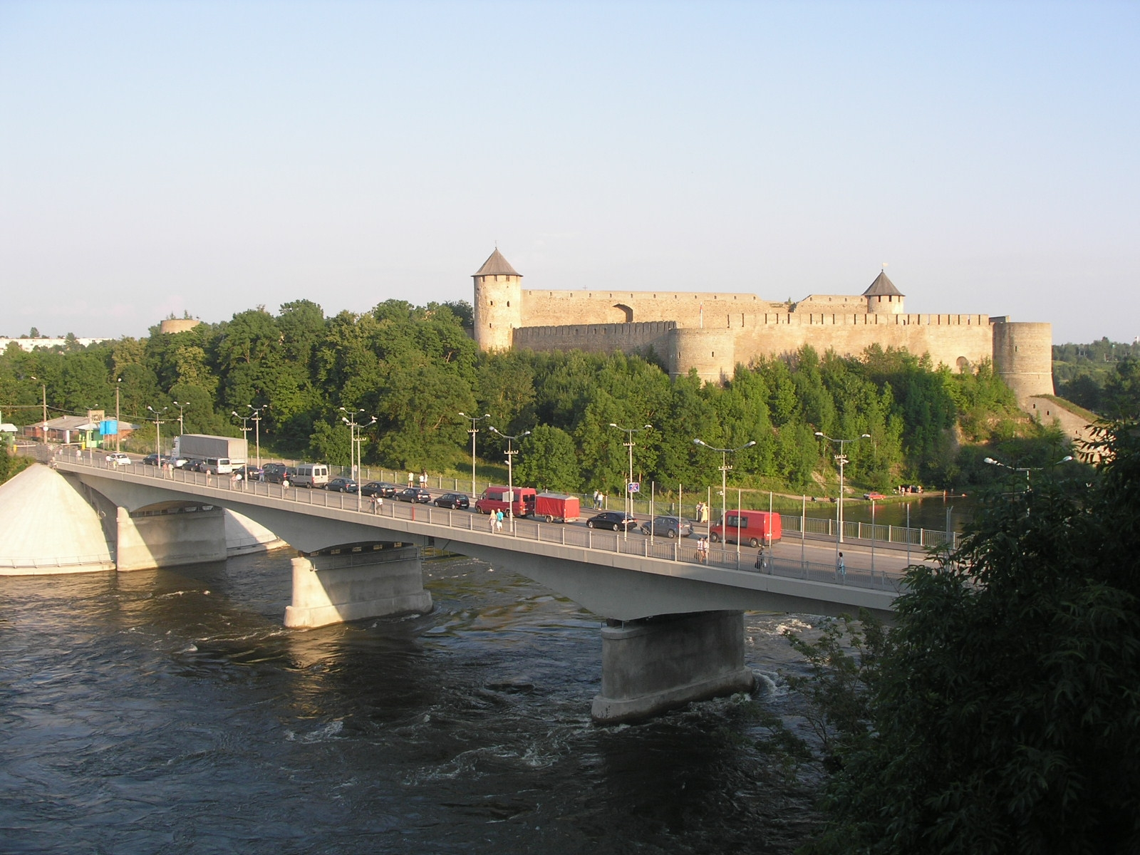 Sõpruse sild Narva jõel, taustal Ivangorodi linnus.